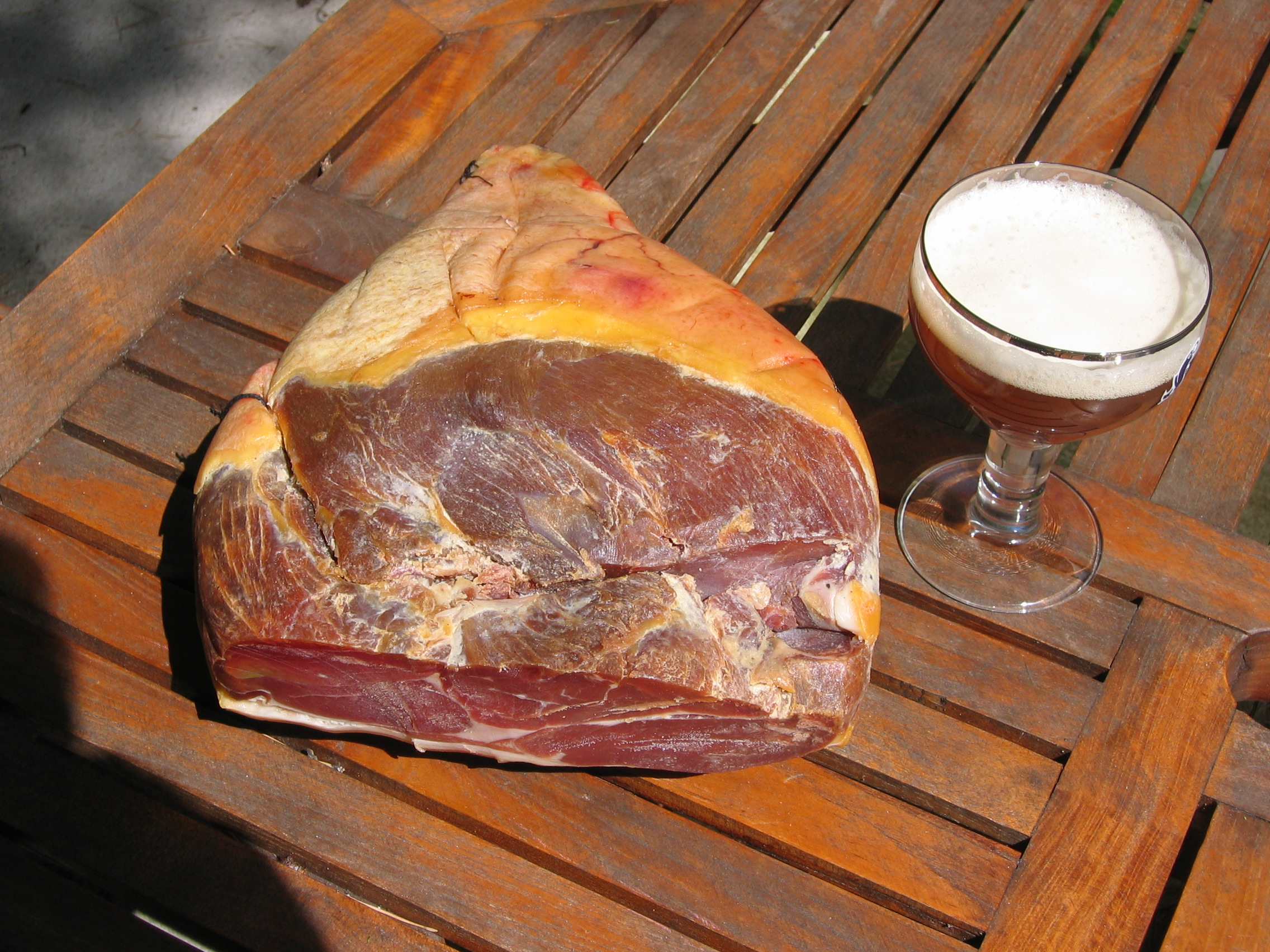 Jamon sec d'Ardennes (France)